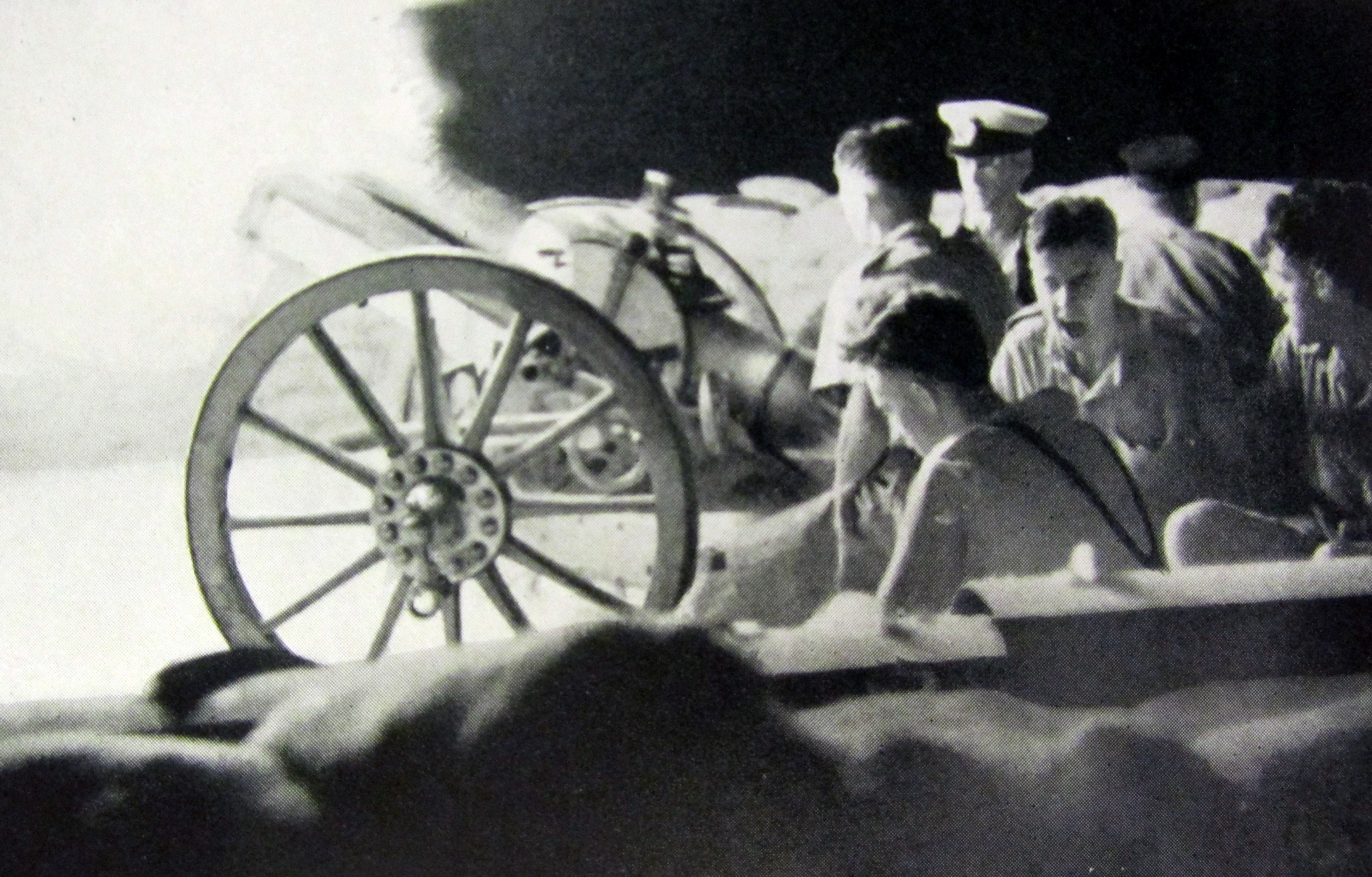 תותח הררי "3.7 במהלך הדגמת ירי בארץ ישראל, 1939